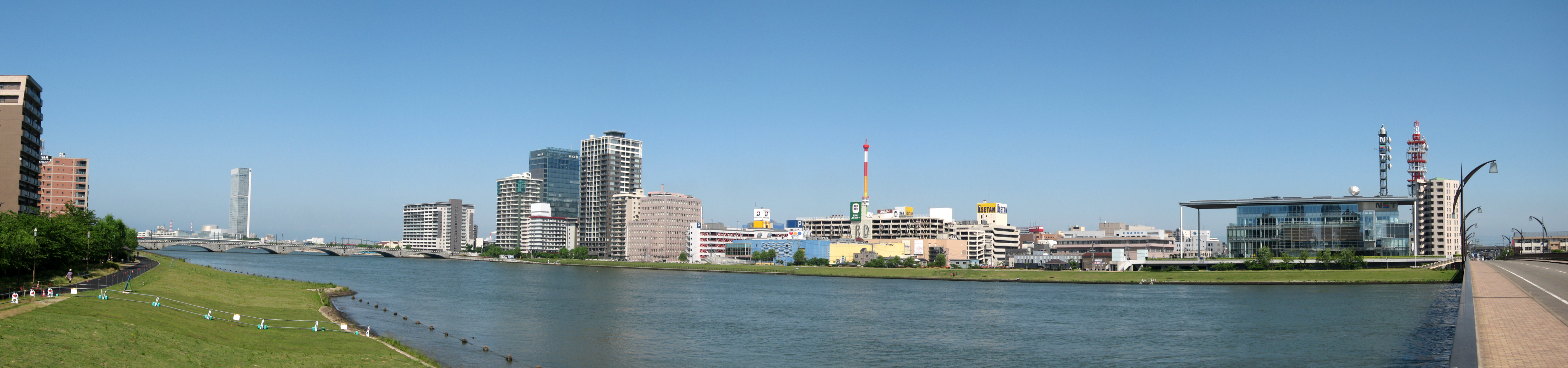 新潟市中央区、八千代橋から見た万代地区のパノラマ写真。2013年6月3日に撮影後、photoshopにて合成。